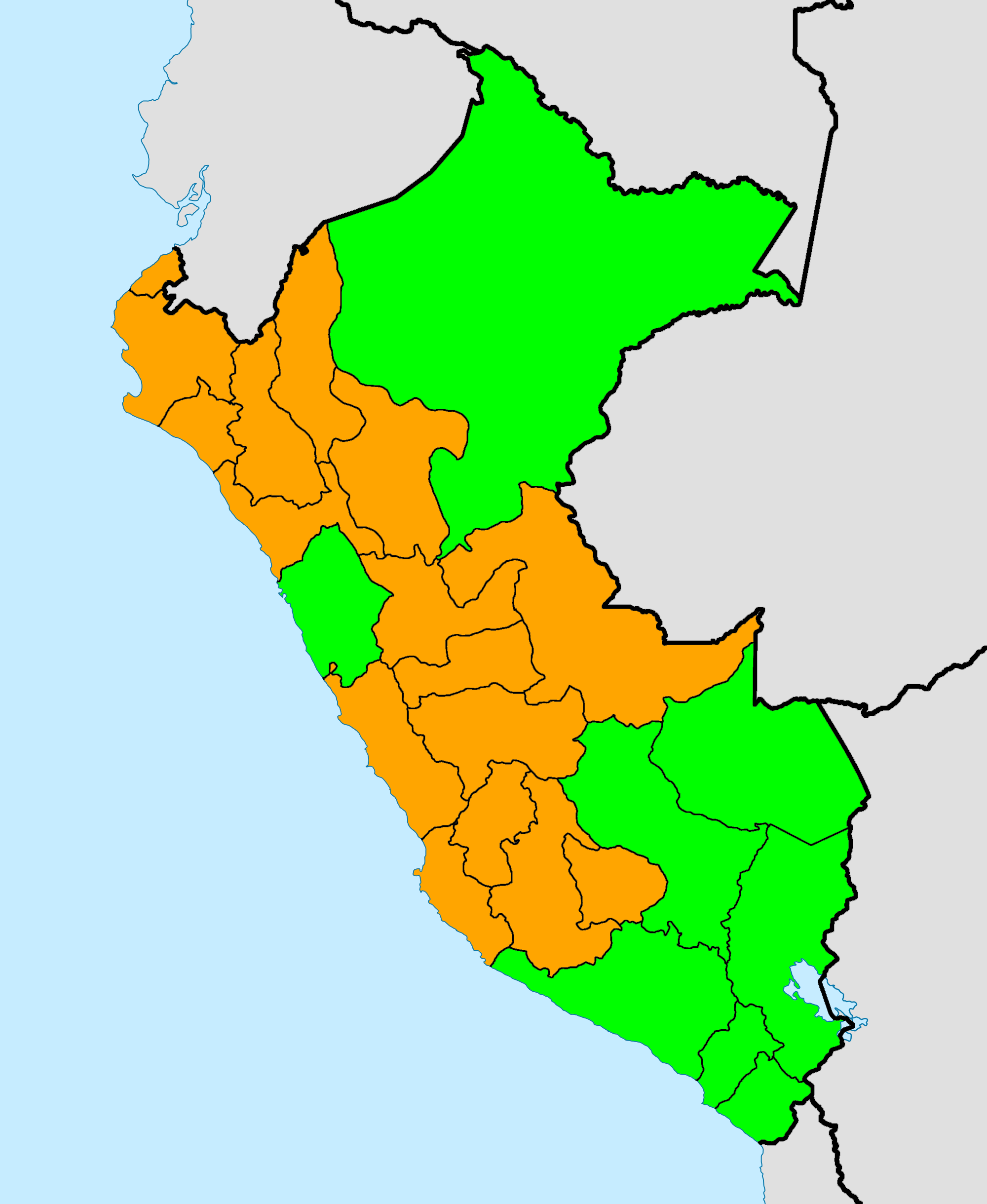 Candidato vencedor por departamento: en naranjo Peru 2000, en verde Peru Posible